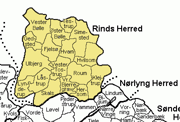 Rinds Herred, Viborg Amt, Denmark